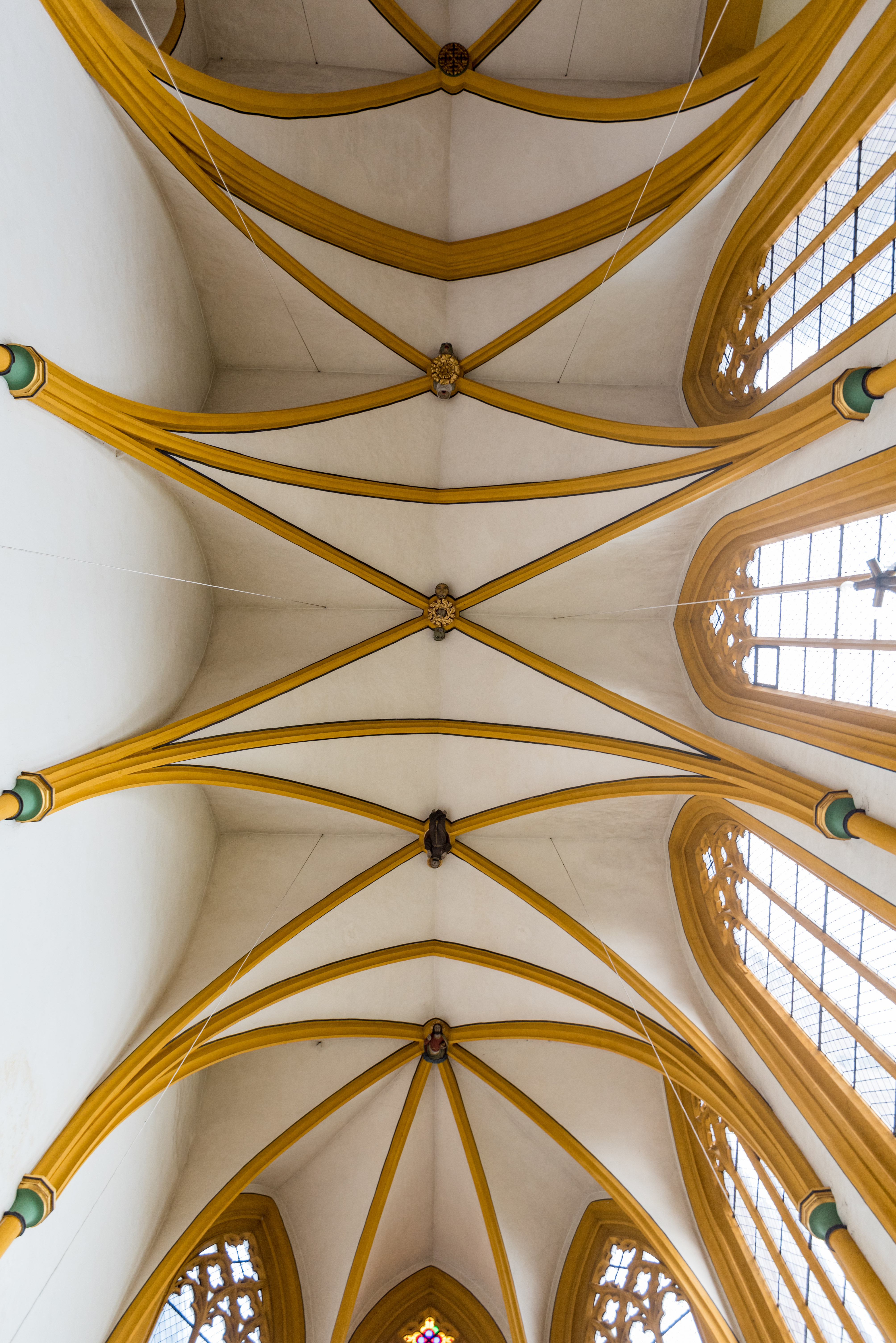 Chorgewölbe der Minoritenkirche in Fritzlar